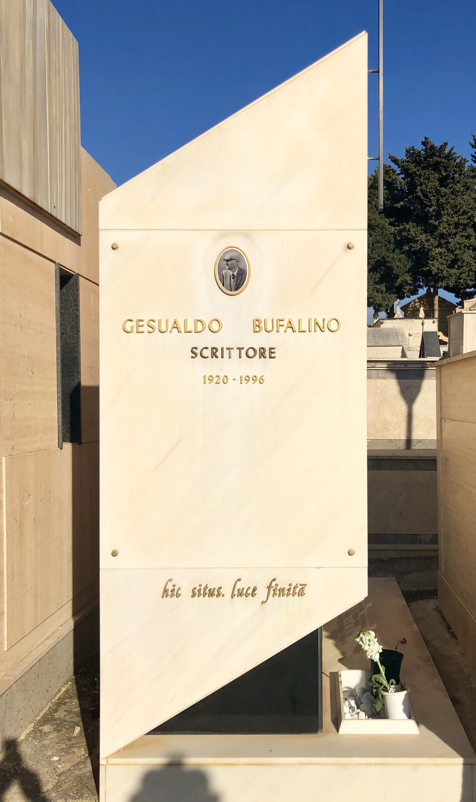 Posta nella fila 25